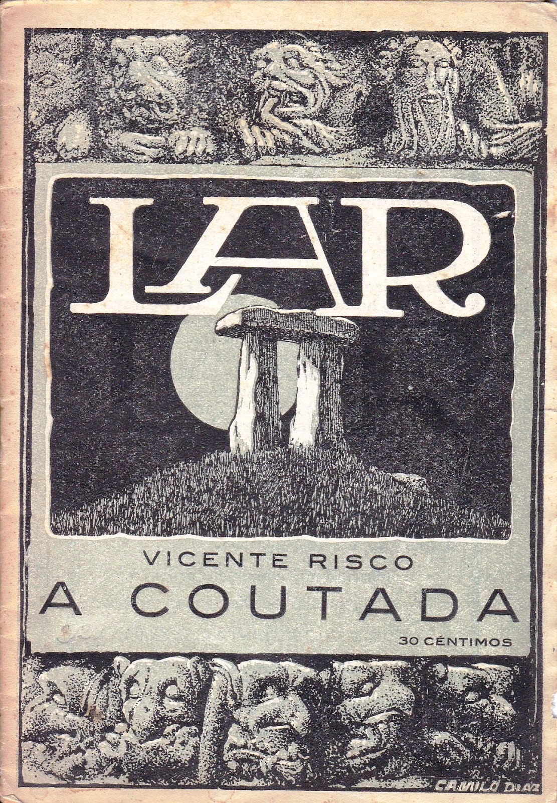 22 A Coutada. Vicente Risco. Lar. 1926.jpg